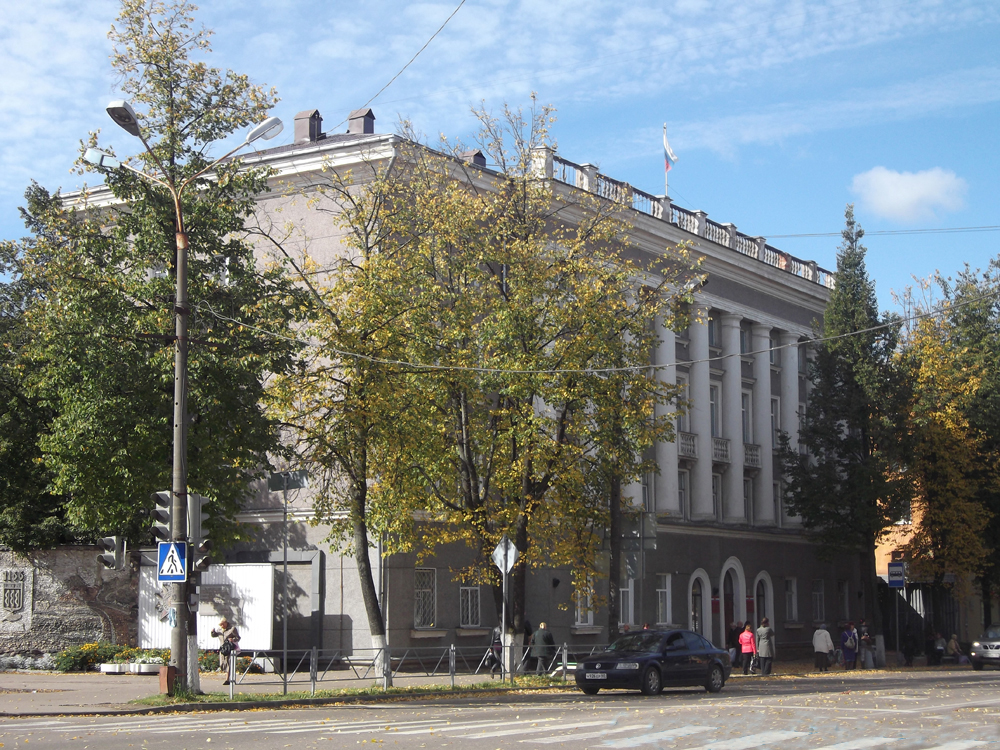 Здание Великолукской городской Думы